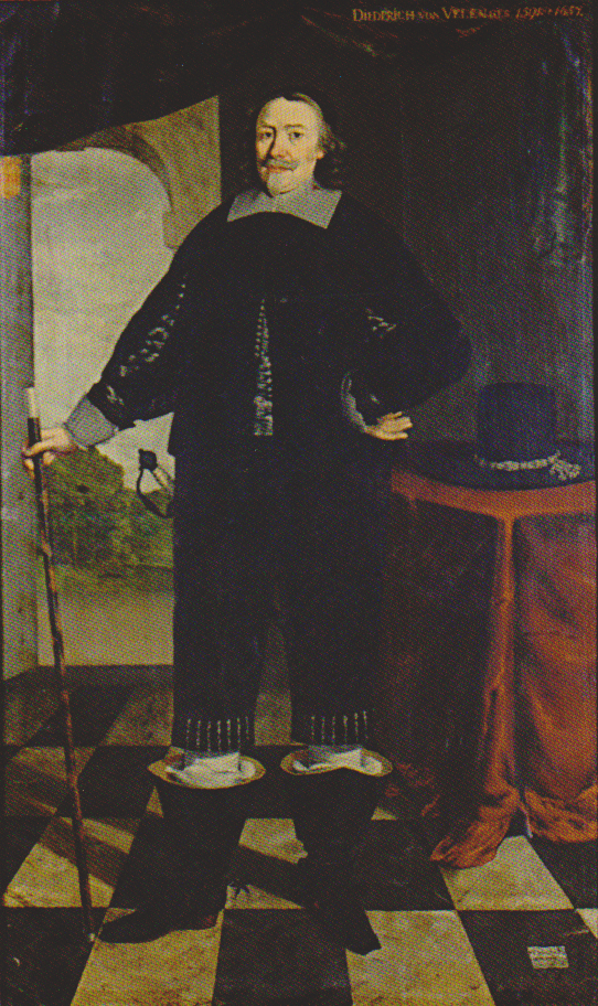 Anonymes Porträtgemälde des Dietrich von Velen (1591–1657), aus der Zeit um 1640/50.